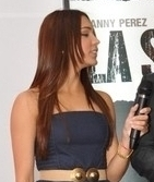 Michelle Vargas en la premiere de La Soga.